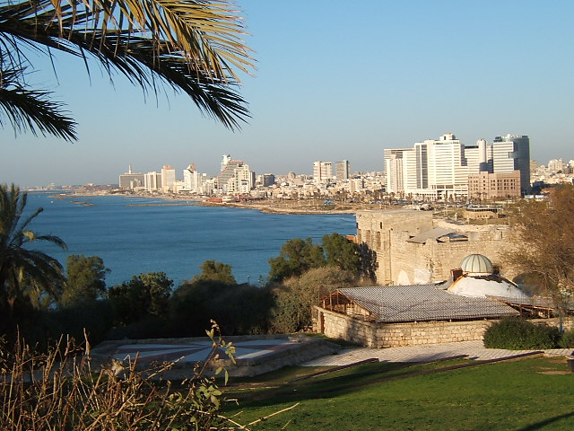 Tel Aviv From Old Yaffo